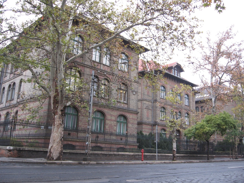 A gödöllői Szent István Egyetem, Ybl Miklós Építéstudományi Karának épülete a Thököly úton.